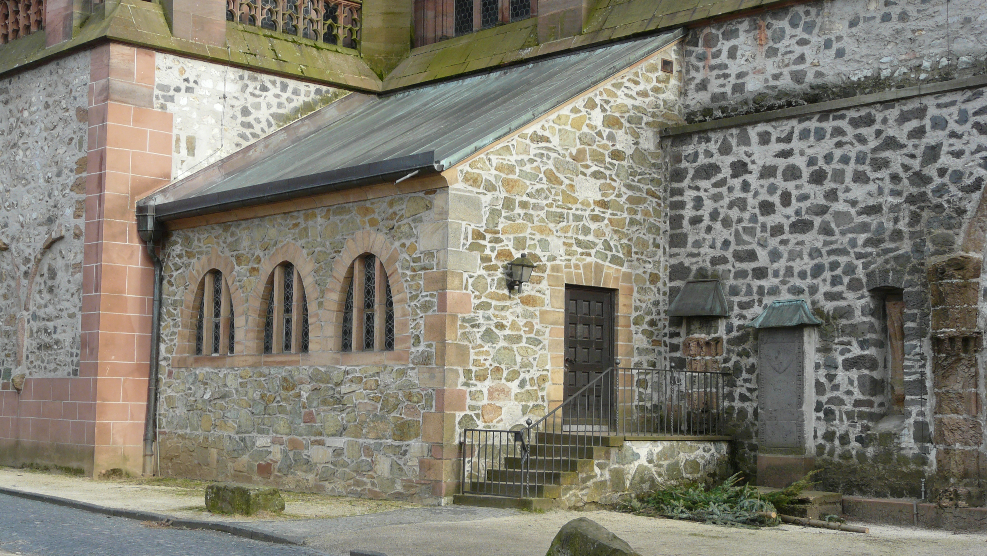 Die evangelische Sakristei im Wetzlarer Dom, Wetzlar (Hessen)